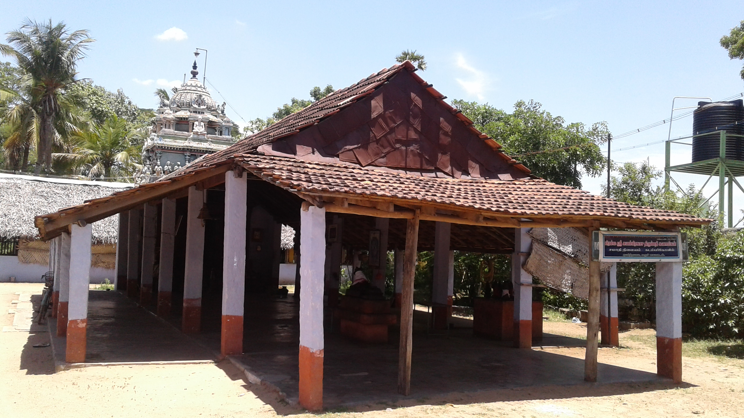 திருப்பதி சாமிகள் ஜீவசமாதி கோயில் முகப்பு, குளித்தலை